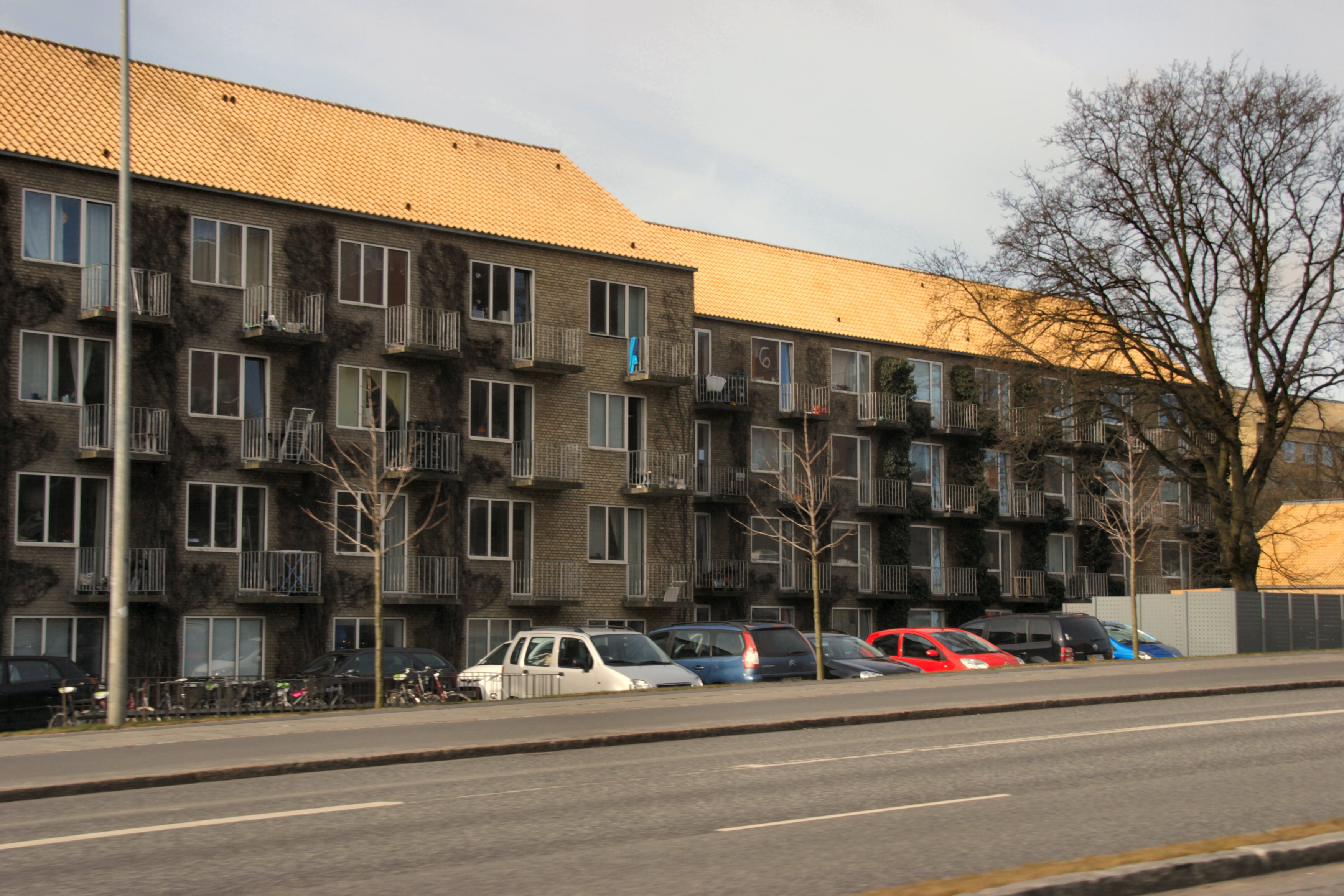 Kollegierne i Universitetsparken i Aarhus ved Nørrebrogade, Aarhus, Denmark